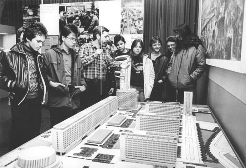 Dresden, Jugendstunde im Stadtmuseum ADN-ZB Hieke-30.1.84 Dresden: Jugendstunde. Wissenswertes über ihre Heimatstadt erfahren Jungen und Mädchen der Klasse 8b der 38. POS Alfred Thiele während einer Jugendstunde im Museum für Geschichte der Stadt Dresden. Bei ihrem Besuch werden die Schüler mit der Entwicklung der Elbmetropole in fast 35 Jahren DDR bekannt gemacht. Auf dem Modell sehen die Teilnehmer der Jugendstunde die Prager Straße - heute ein belebtes Einkaufszentrum im Stadtinnern.